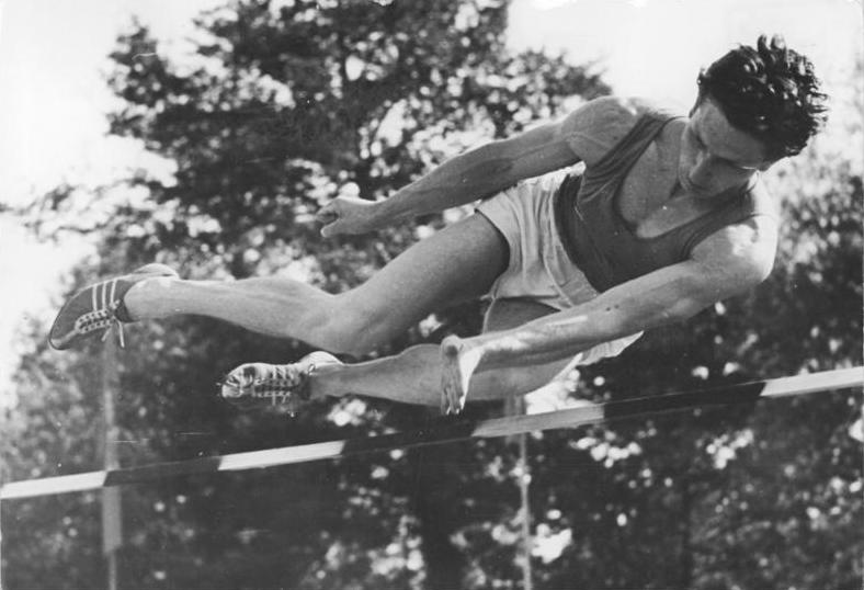 Walter Meier Zentralbild TBD 3.7.1952 3. Leichtathletik-Meisterschaften der Deutschen Demokratischen Republik vom 2. bis 6.7.1952 im Ernst-Abbe-Sportfeld, Jena. Die 3. Leichtathletik-Meisterschaften unserer Republik waren ein Beweis des ständigen Aufstiegs der Leichtathletik in der DDR. UBz: Meier, Einheit Mitte-Halle, wurde mit 1,90 m DDR-Meister im Hochsprung.